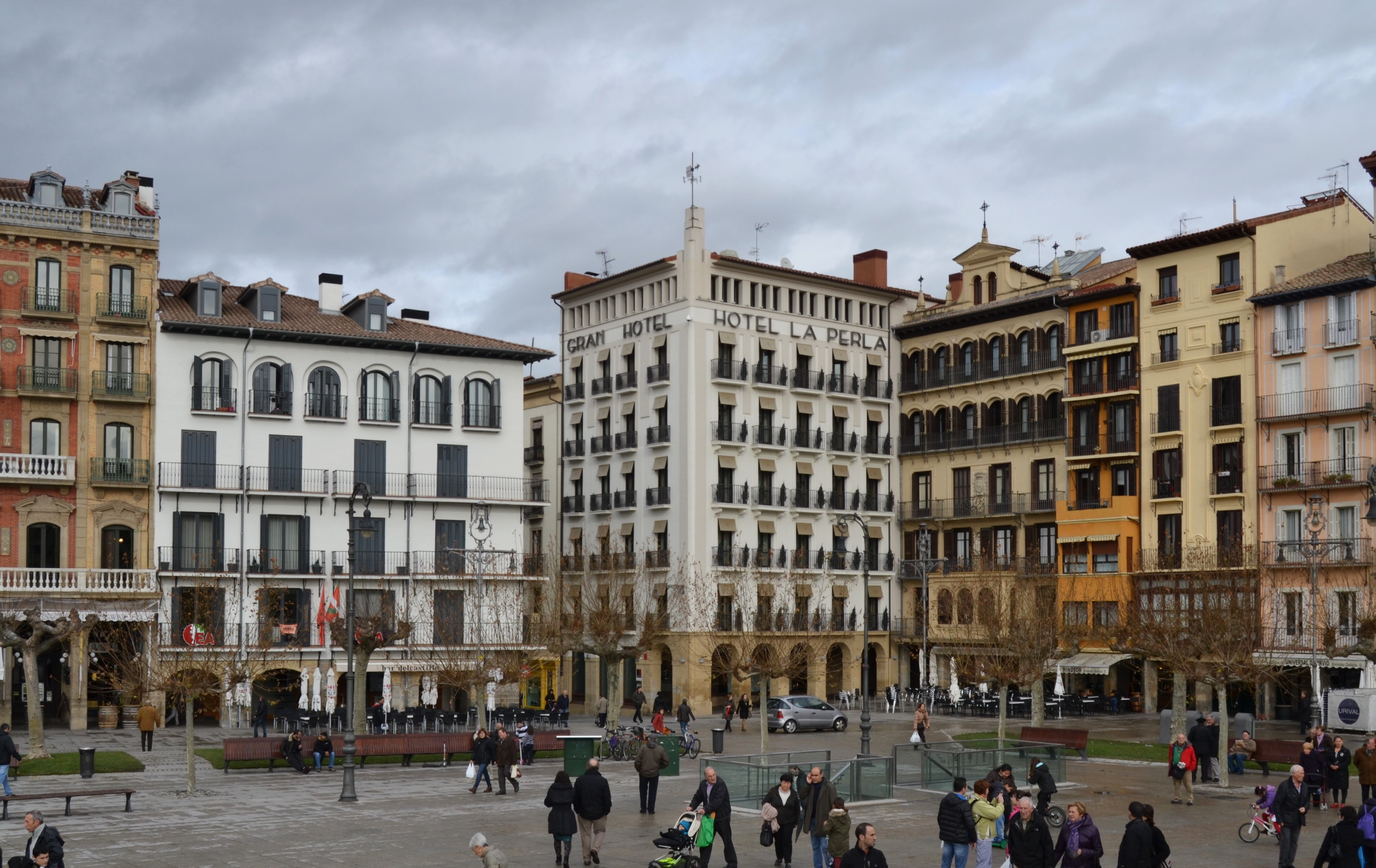 Gazteluko plaza.